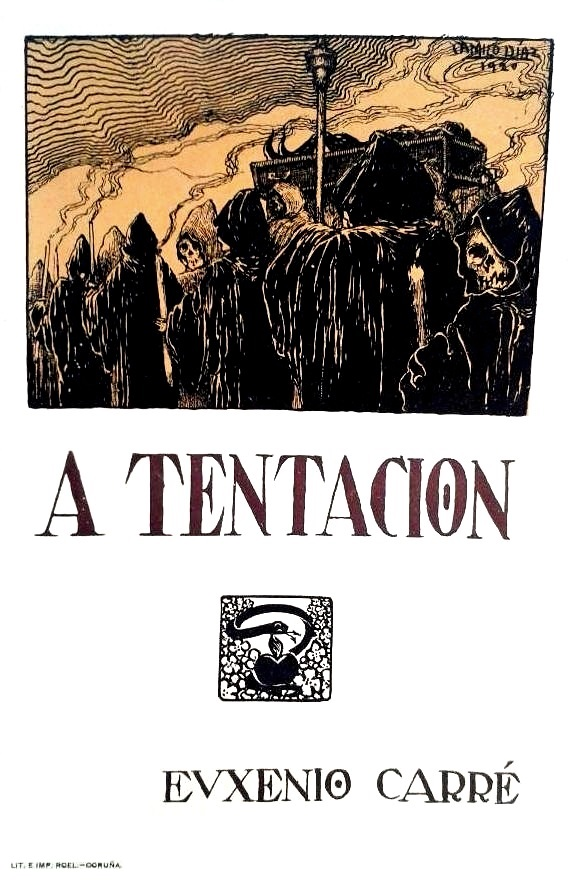 A tentación, ensaio de poema representabre en dúas xeiras, Euxenio Carré Alvarellos